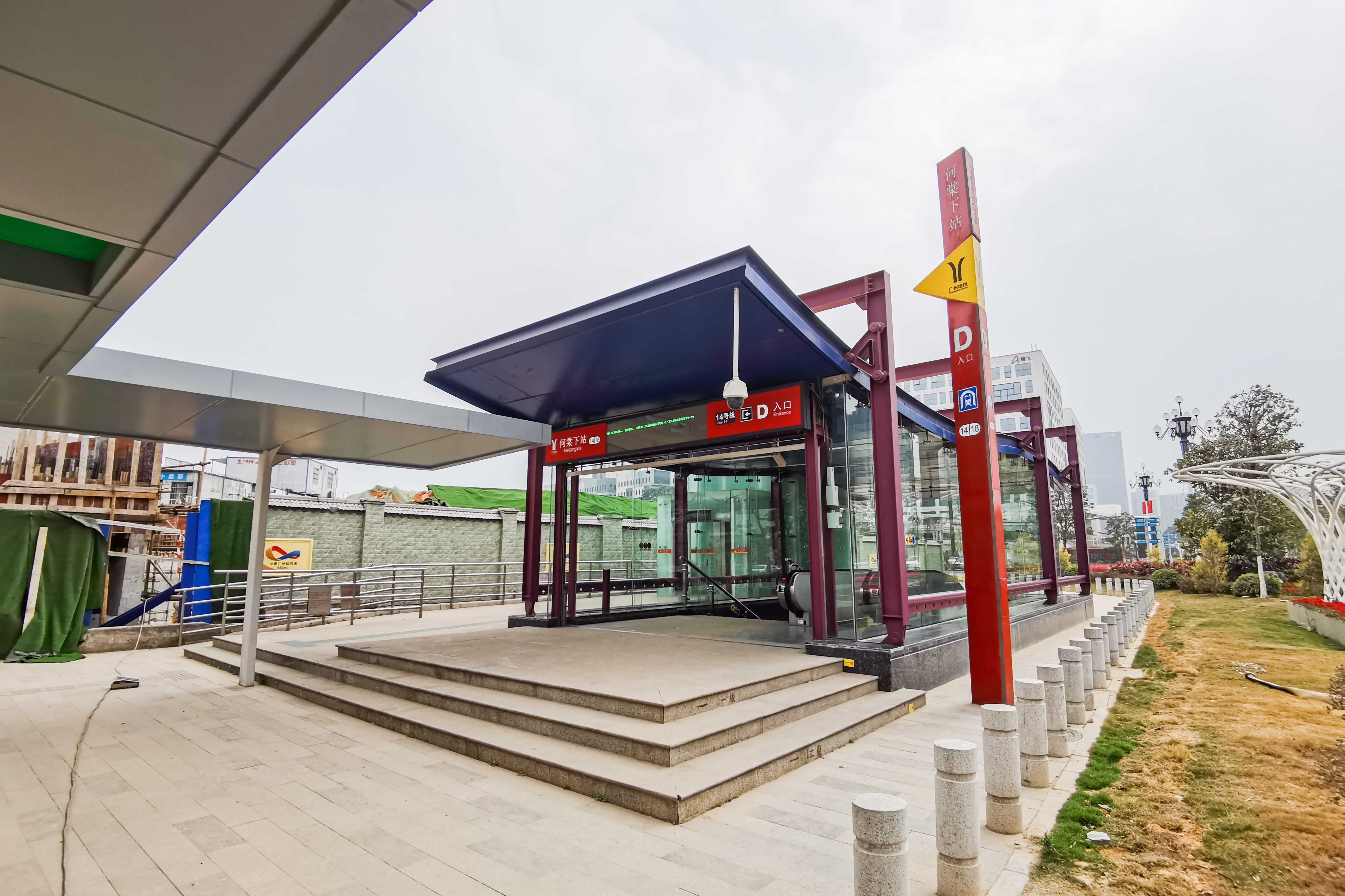 广州地铁何棠下站